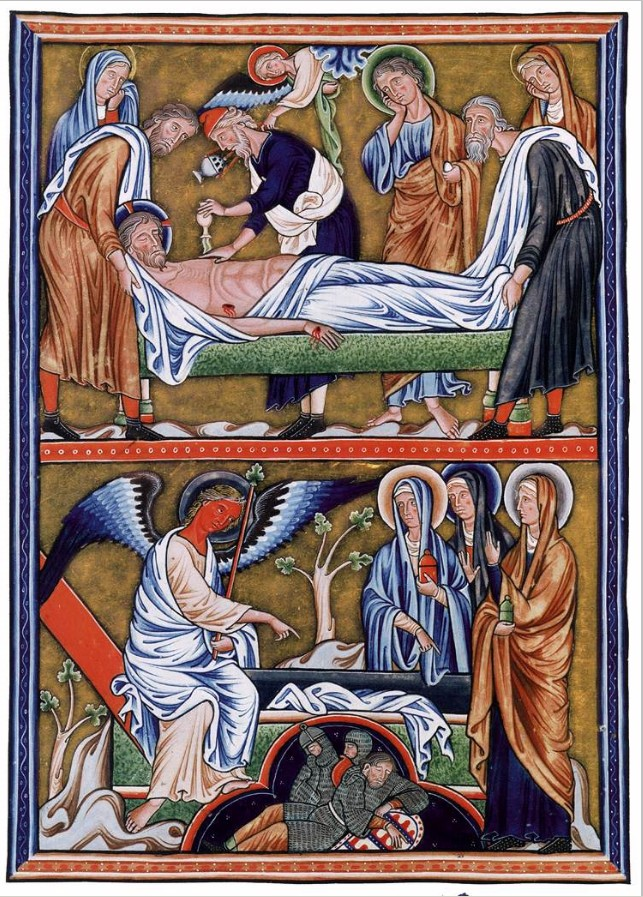 Žaltář Ingeborg Dánské